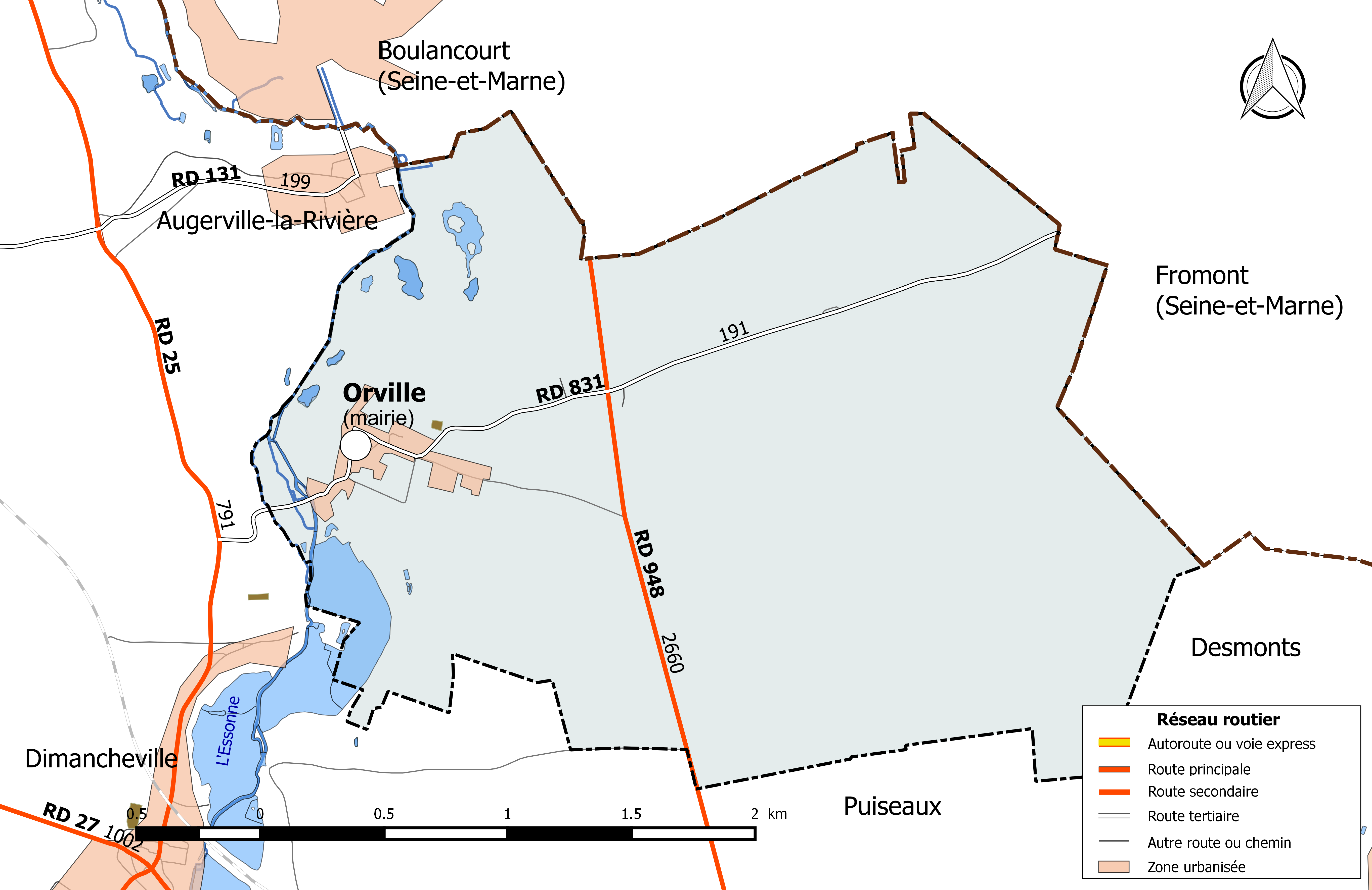 Carte du réseau routier de la commune de Orville (Loiret).